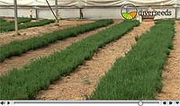 Diverseeds